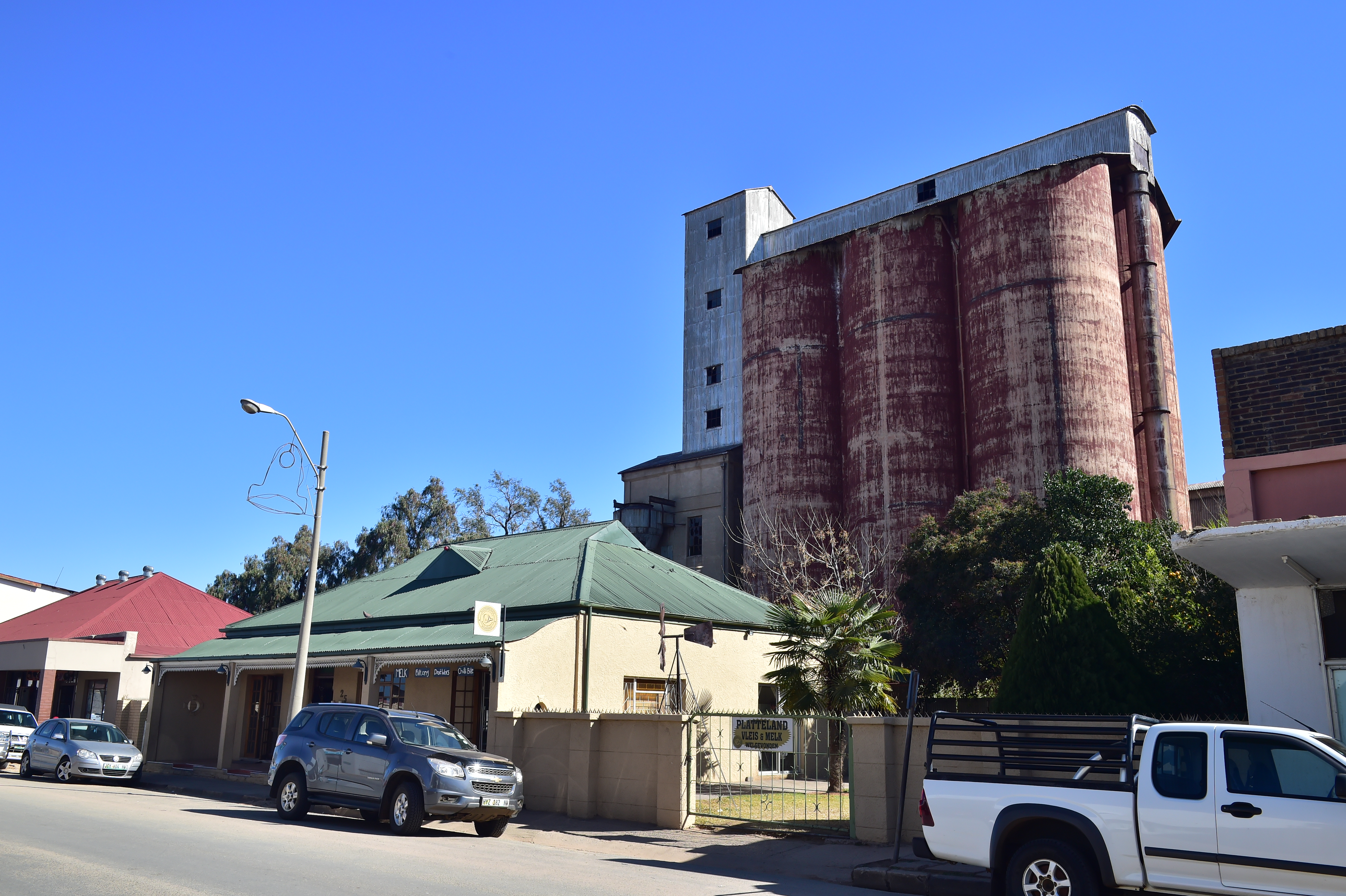 Vue du North West en Afrique du Sud.